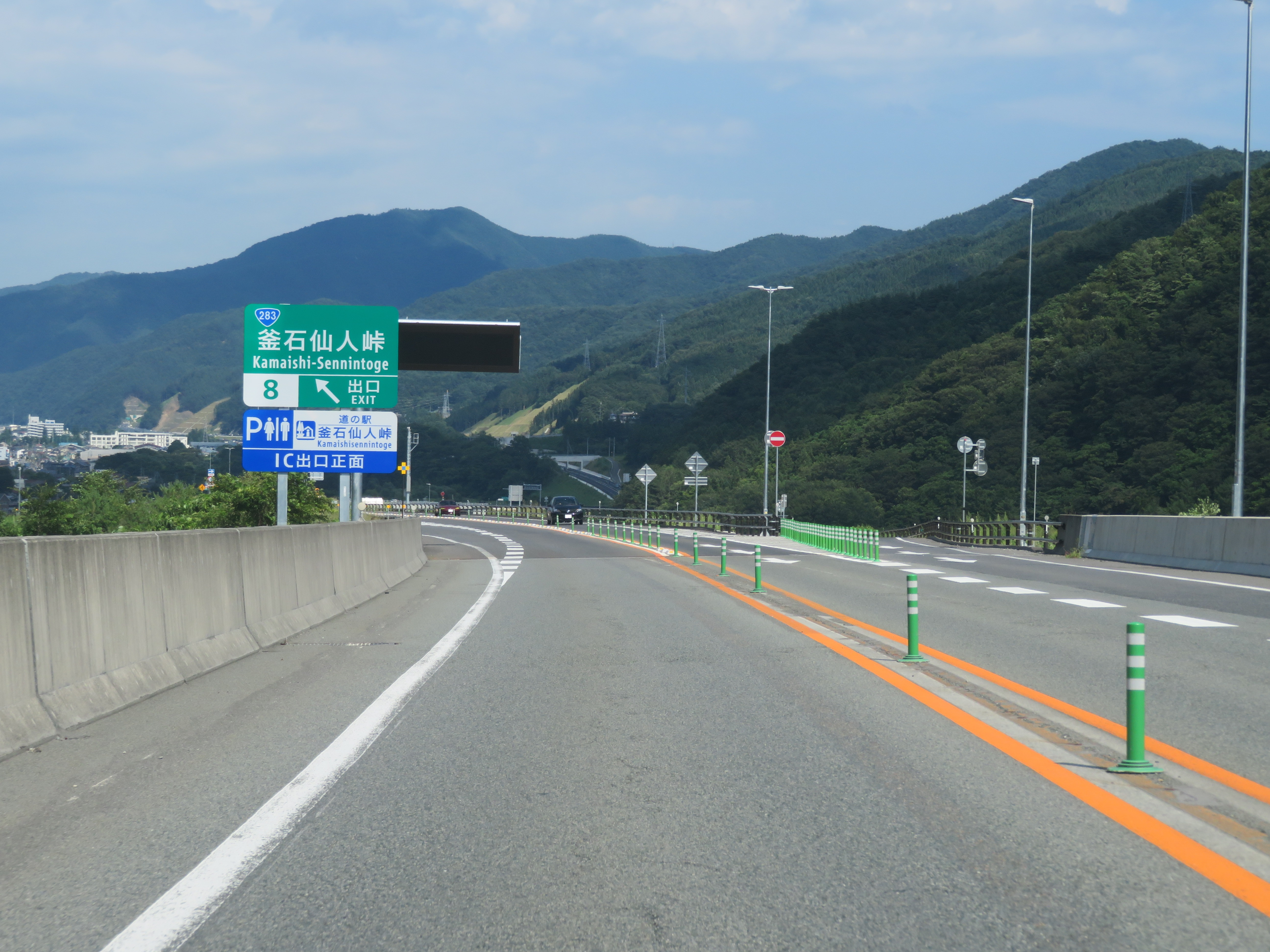 釜石自動車道 釜石仙人峠ＩＣ出口付近（花巻ＪＣＴ方面から撮影）